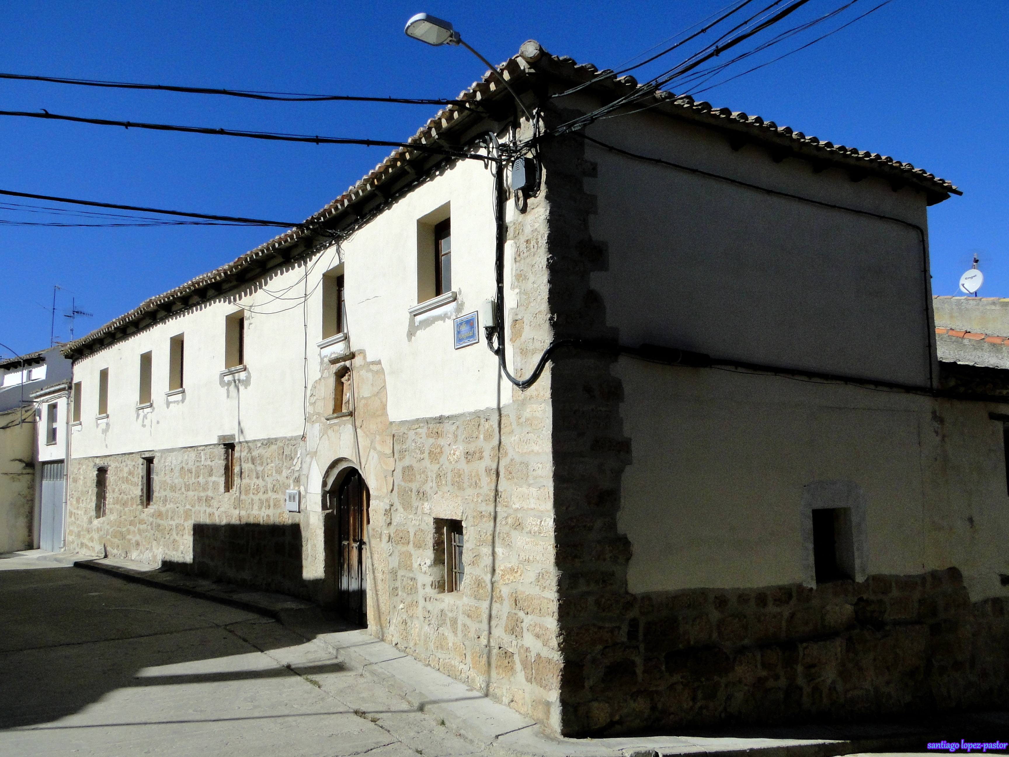 Baltanás